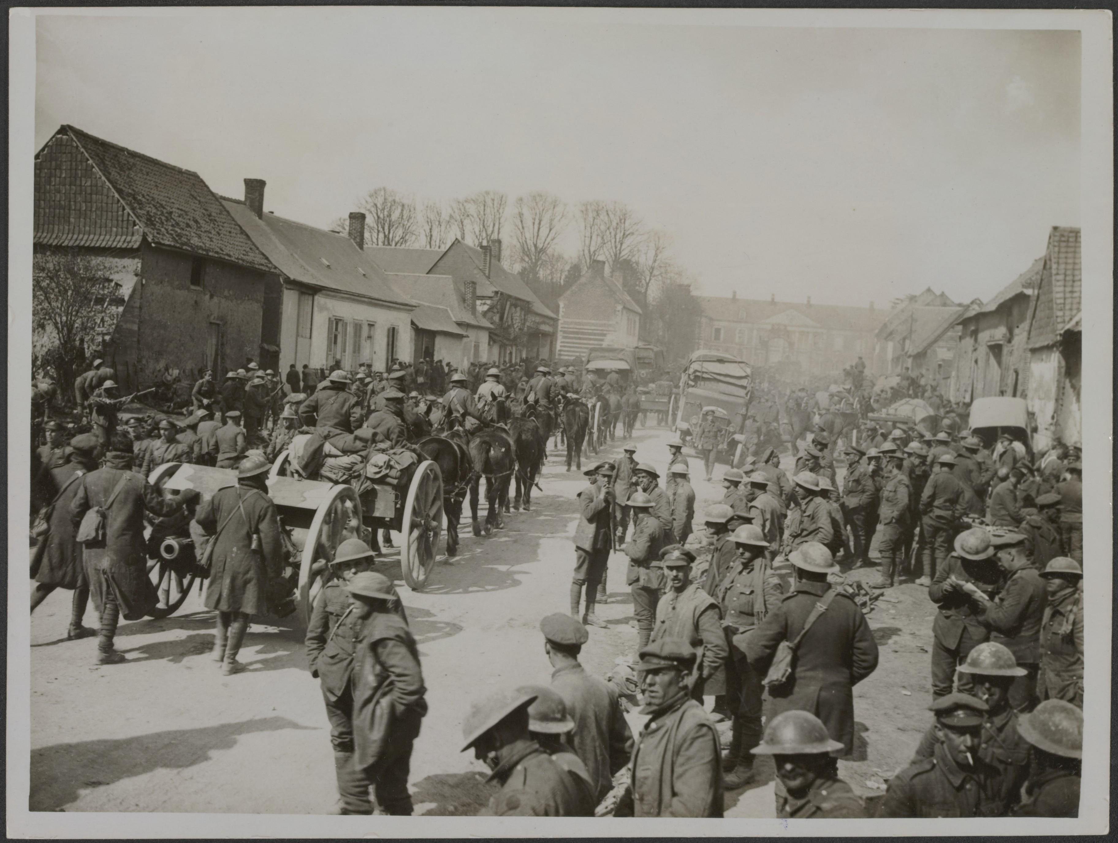 Collectie / Archief : Fotocollectie Eerste Wereldoorlog Reportage / Serie : The British Western front in France. The German offensive Beschrijving : Royal Field Artillery advance through a village. Annotatie : Het Britse Westelijk front in Frankrijk. Het Duitse offensief. De Koninklijke Veldartillerie trekt op door een dorp. Datum : {1914-1918} Locatie : Frankrijk Trefwoorden : aanvallen, artillerie, dorpen, eerste wereldoorlog, fronten Fotograaf : Associated Illustration Agencies# Auteursrechthebbende : Public Domain logo Materiaalsoort : Foto (zwart/wit) Nummer archiefinventaris : bekijk toegang 2.24.09 Bestanddeelnummer : 158-1851